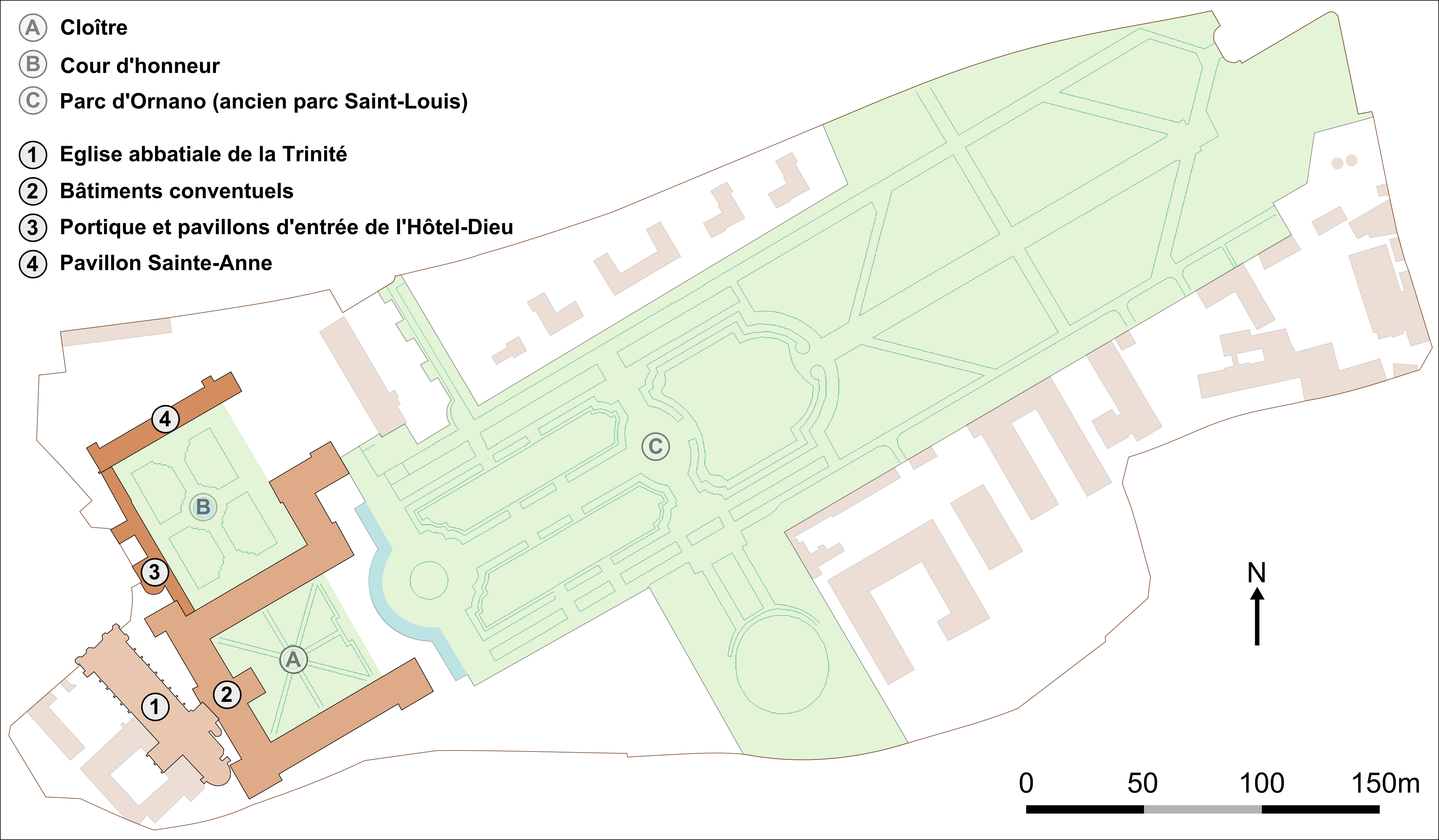 Plan de l'abbaye aux Dames de Caen en 2008